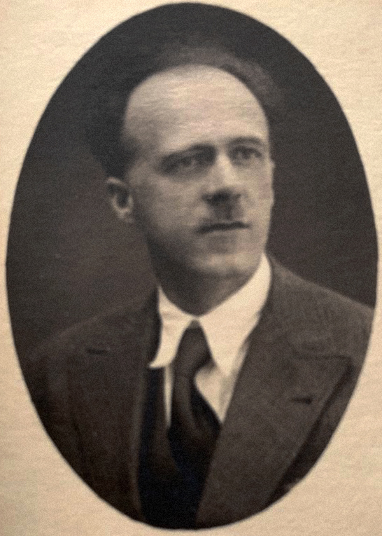 Carlo Curto